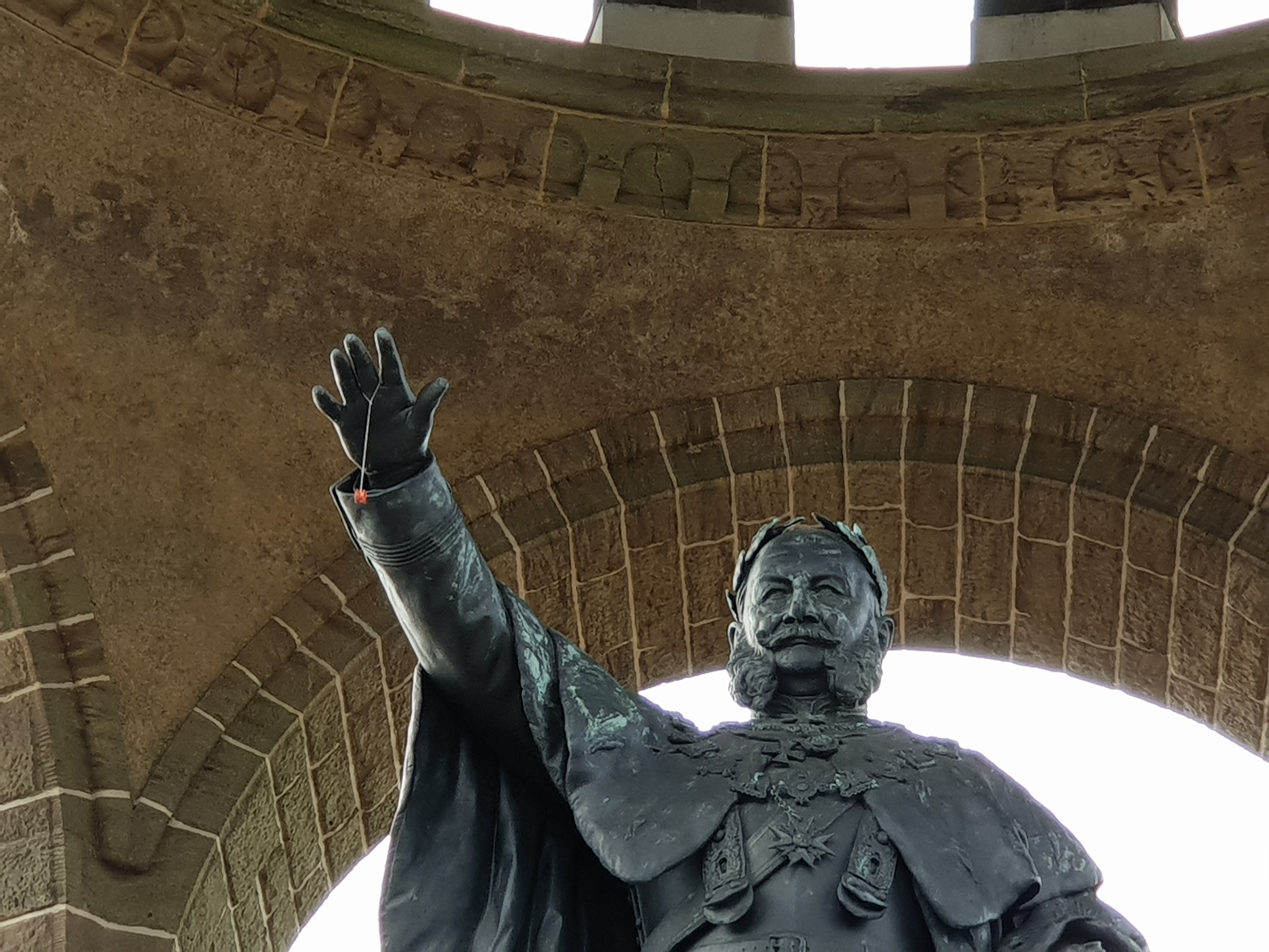 Jo-jo an der ausgestreckten Hand des Kaisers.